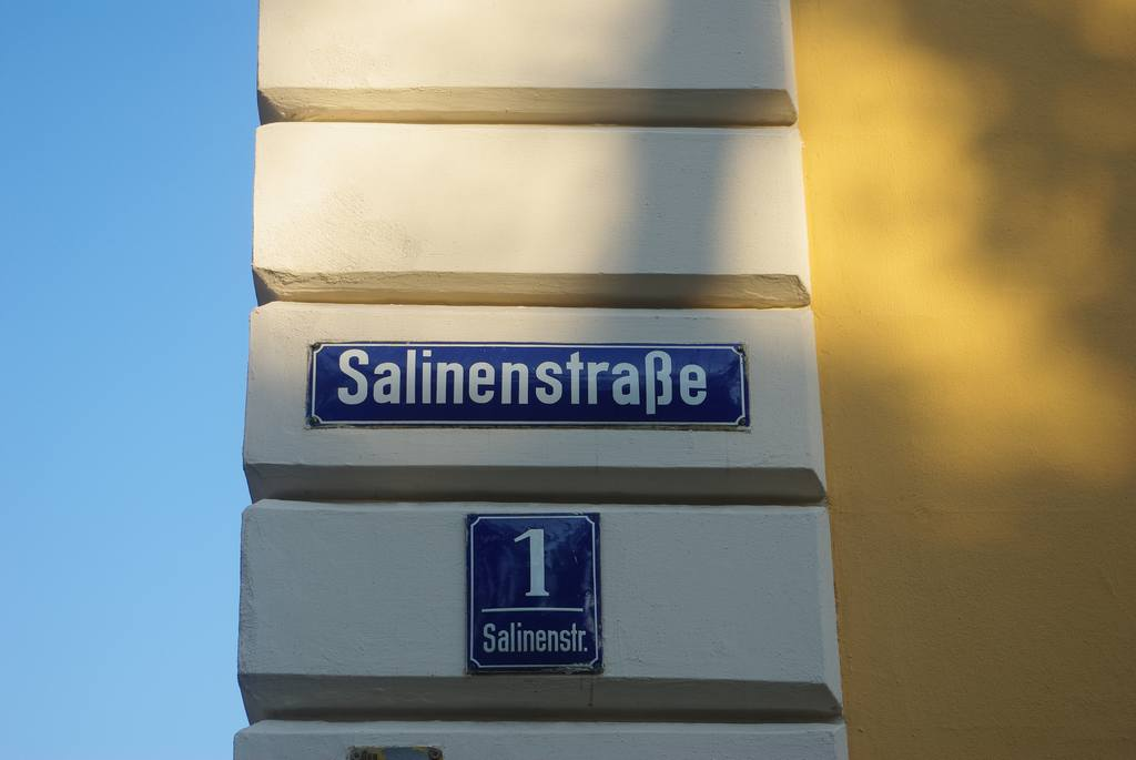 Schild an der Salinenstraße 1 (Beamtenstock der Alten Saline) in 83435 Bad Reichenhall